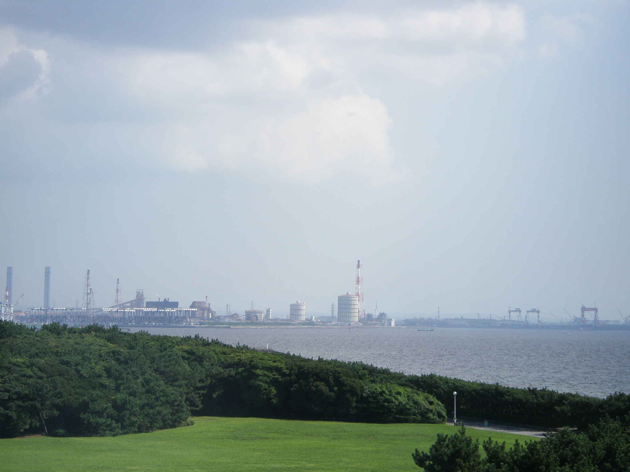 稲毛記念館からの眺め